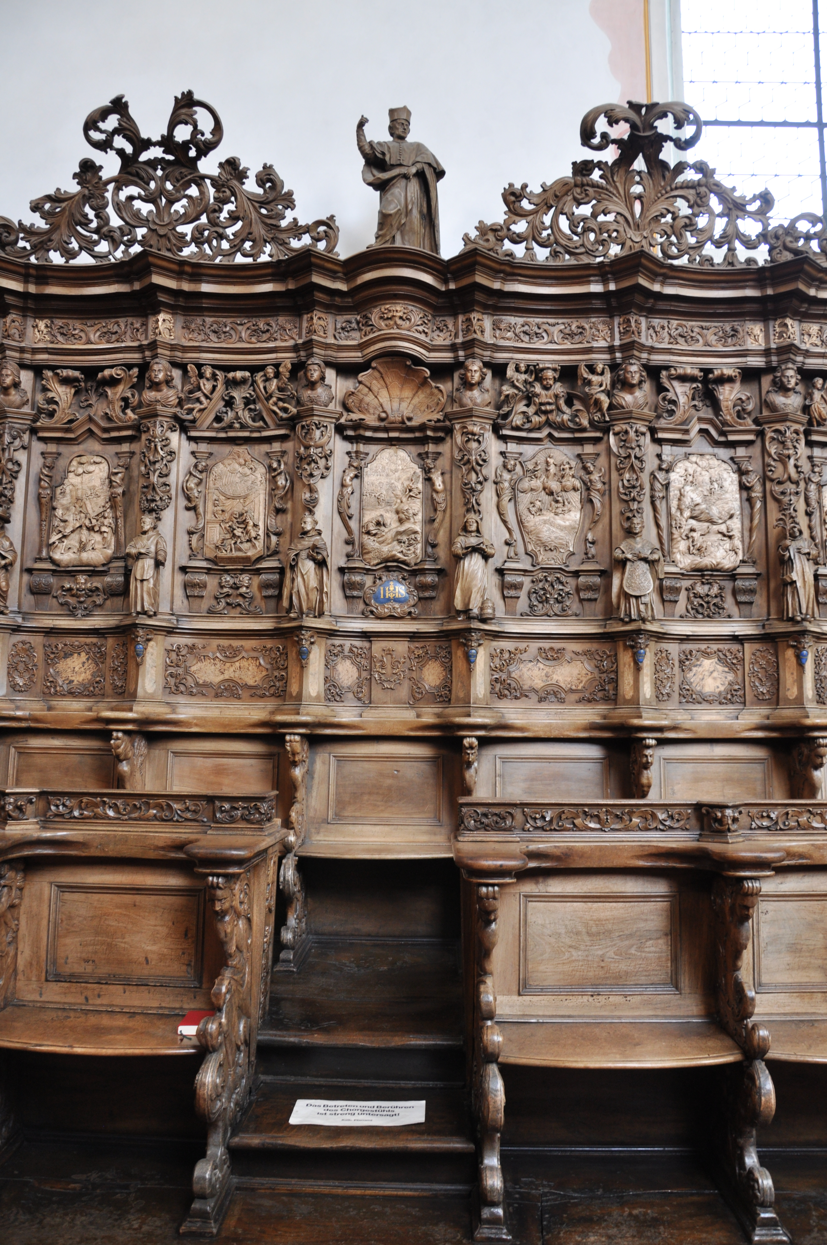 Bad Schussenried, Pfarrkirche St. Magnus (ehemalige Klosterkirche); Chorgestühl von Georg Anton Machein (und Werkstatt), 1715–1717